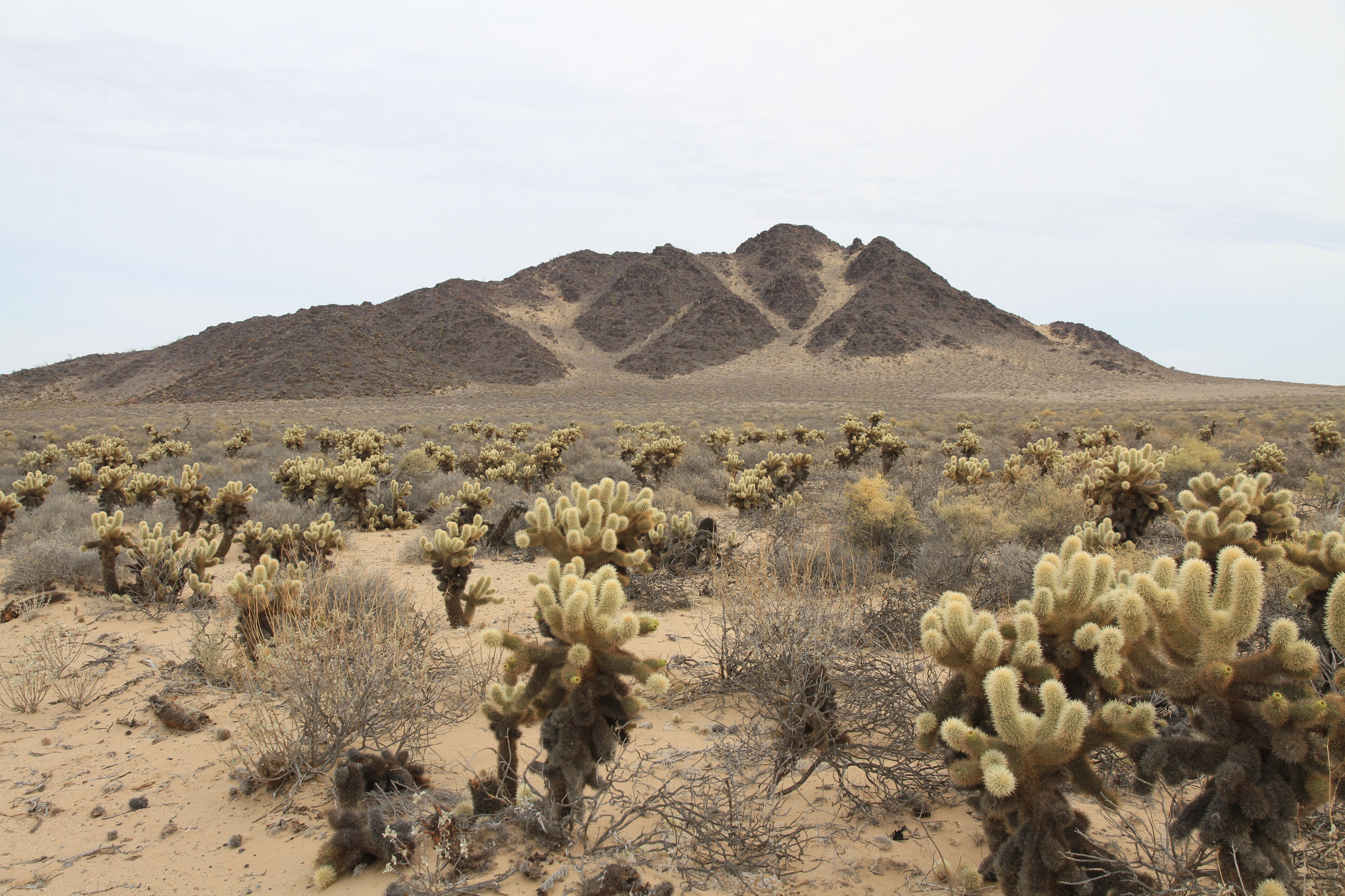 Desierto de Sonora